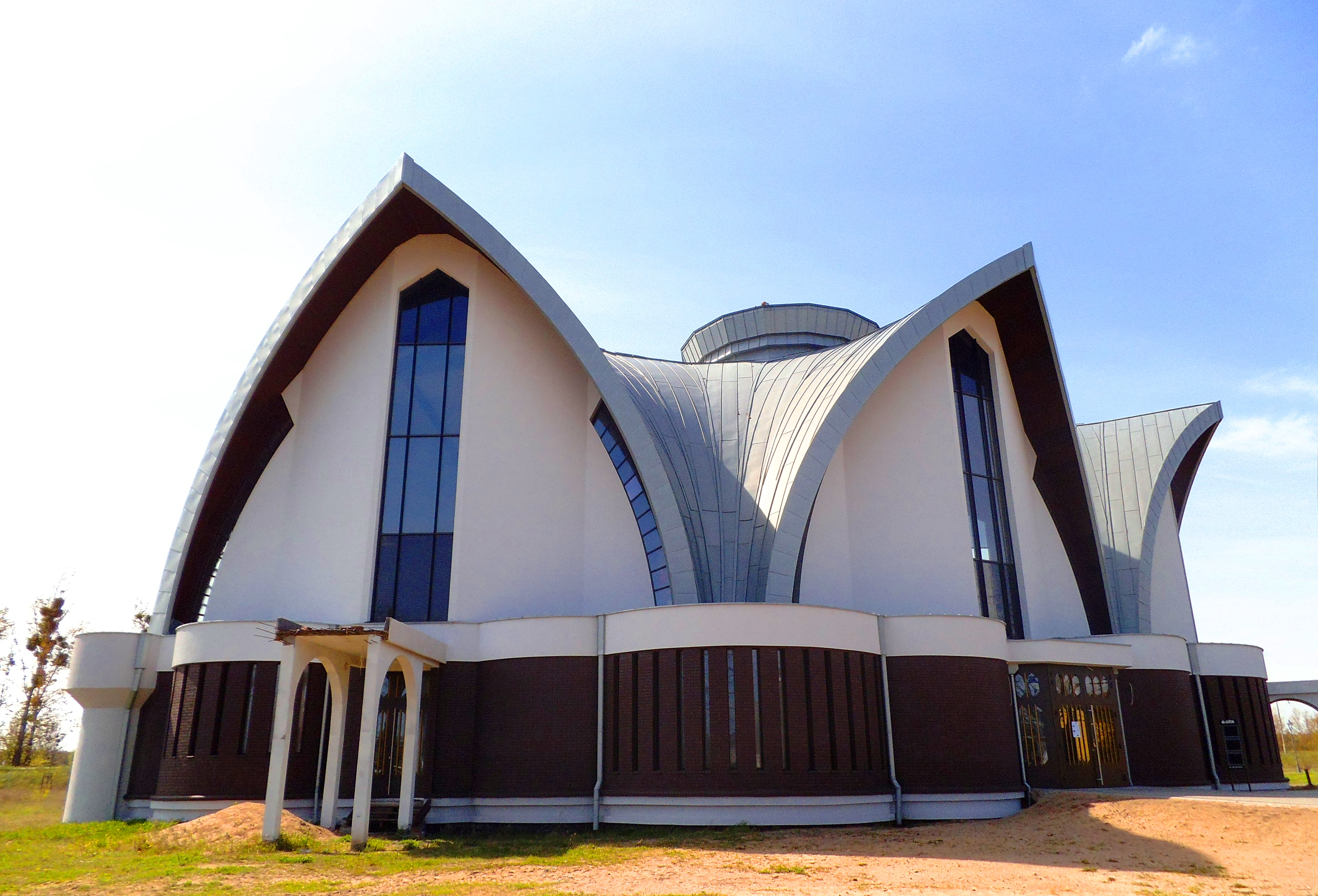 Kościół bł. Stefana Wincentego Frelichowskiego w Toruniu22